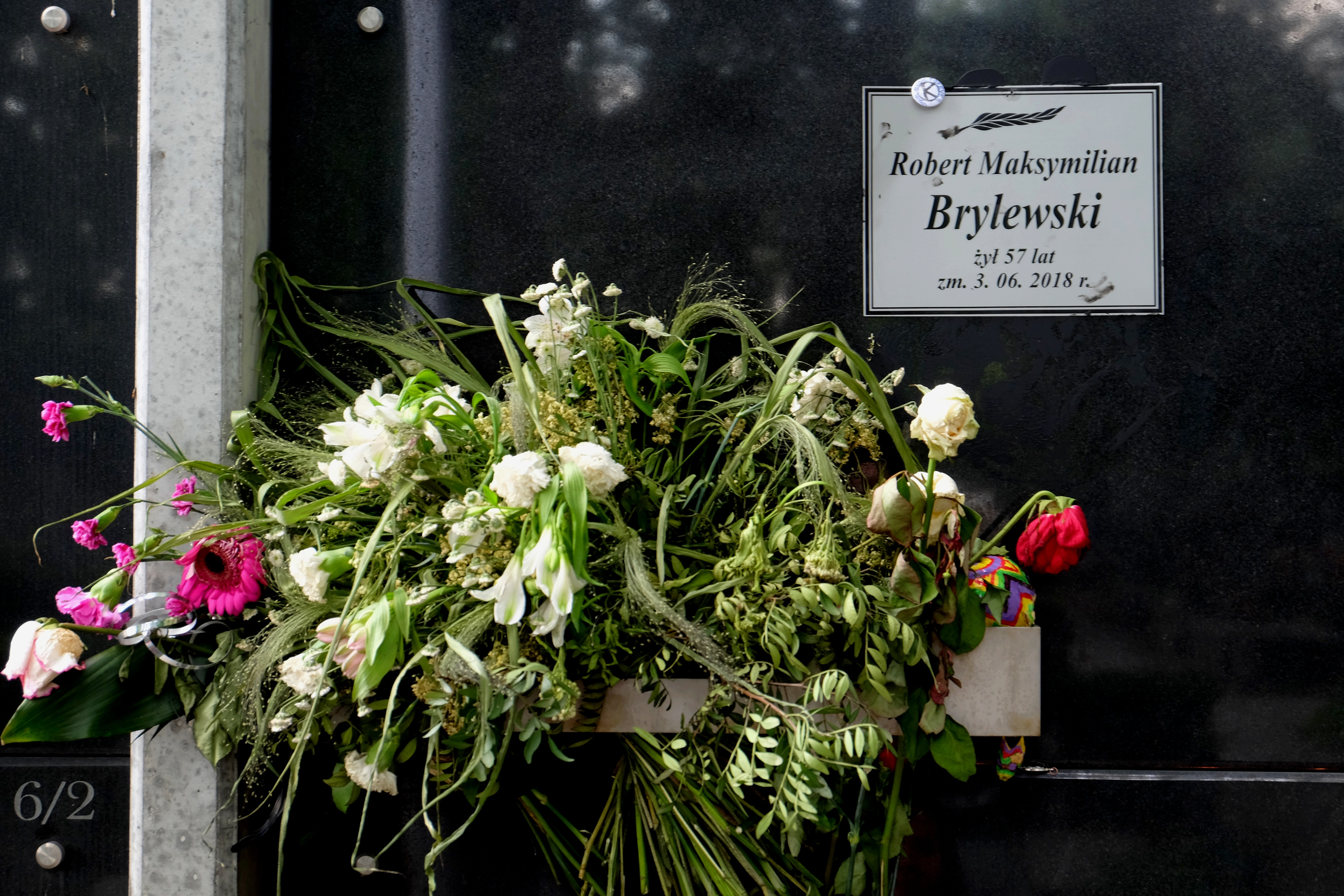 Grób muzyka Roberta Brylewskiego na Cmentarzu Wojskowym na Powązkach w Warszawie